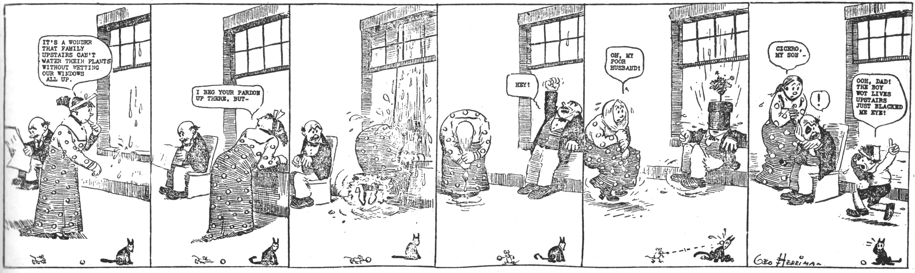 Ein The-Family-Upstairs-Strip (auch: Dingbat Family) mit Maus und Katze als Randfiguren